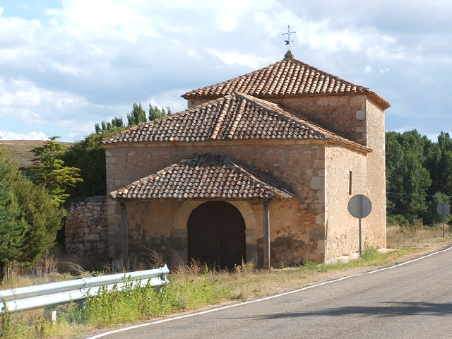 Ermita Nuestra Señora de la Soledad(Caltojar) Soria España.